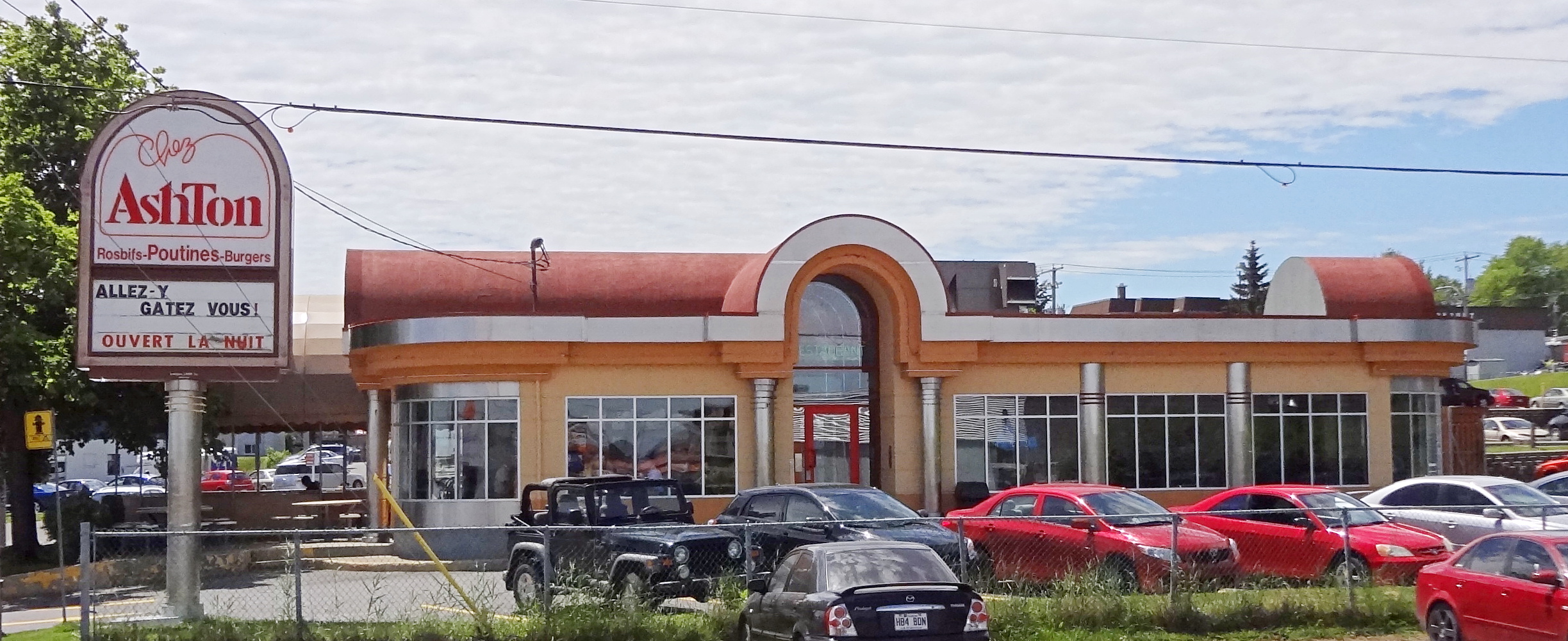 Restaurant Ashton sur le boulevard Hamel à Québec. Correspond au première emplacement de la chaîne.